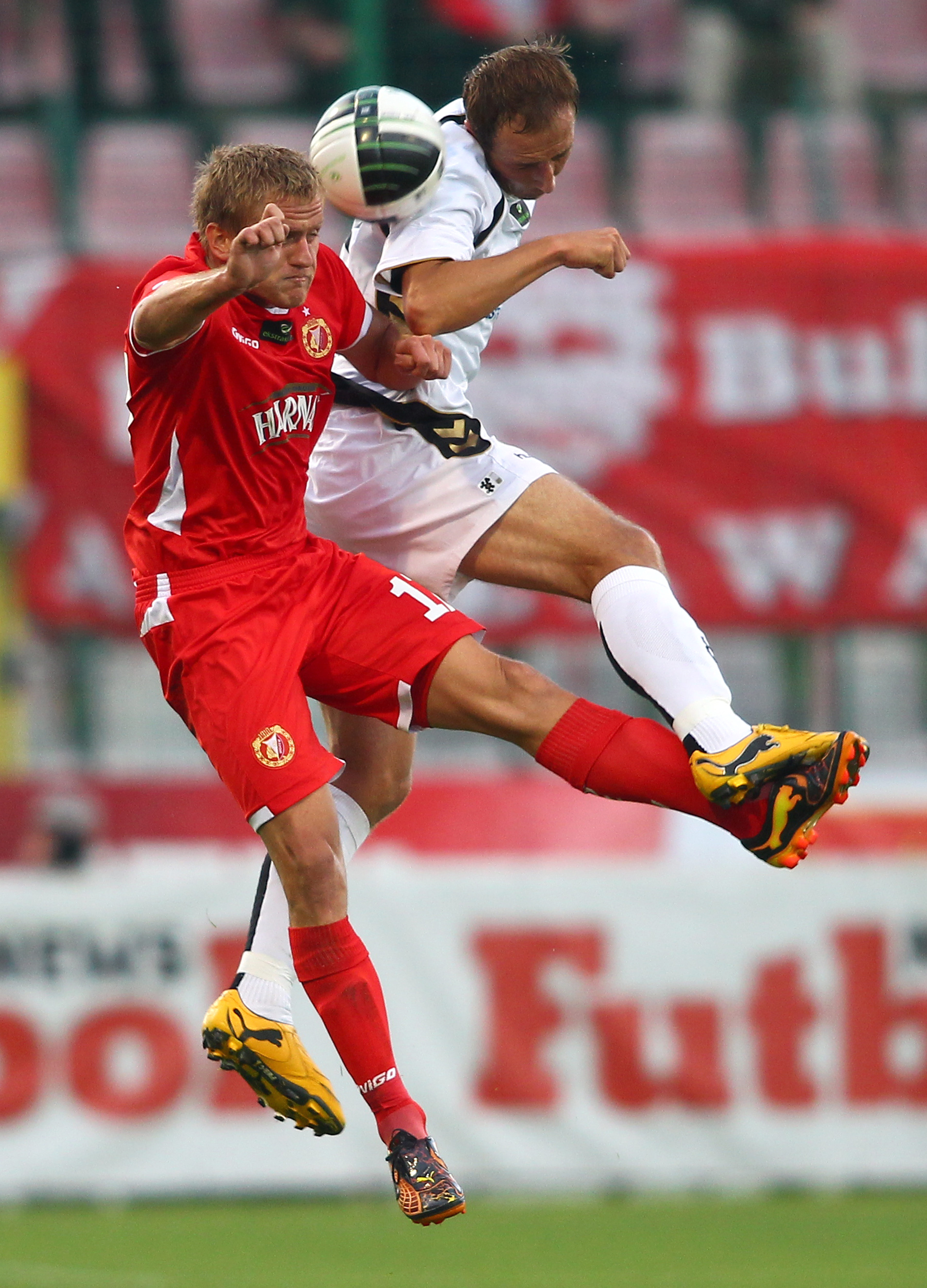 Tomasz Lisowski (left) of Widzew Łódź and Łukasz Trałka (right) of Polonia Warszawa head-to-head during an Ekstraklasa match